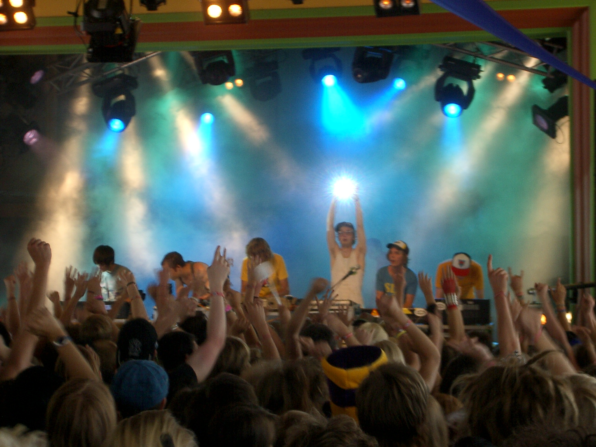 Slagsmålsklubben on the Arvika festival, 2005